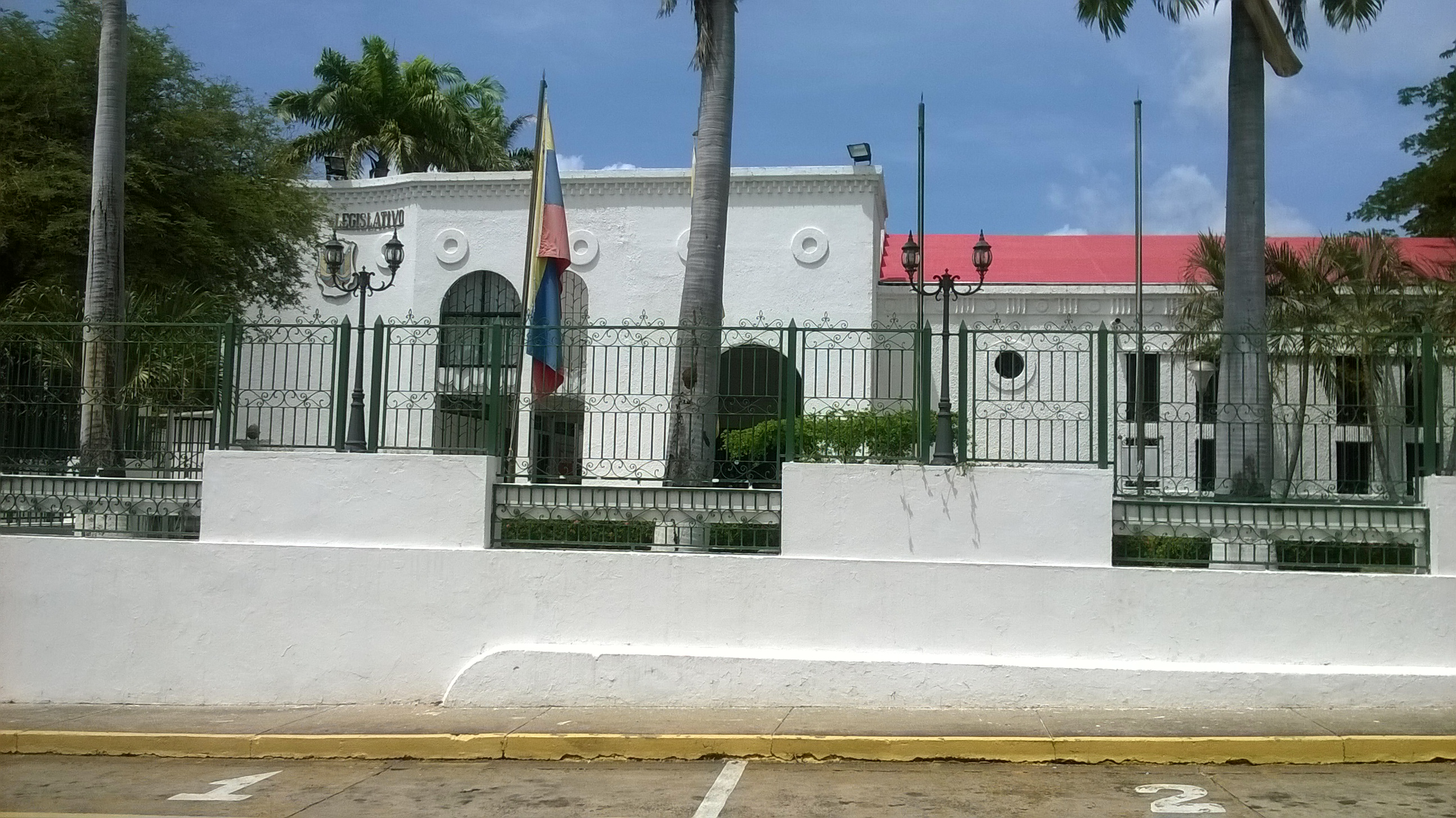 Sede del "Palacio Legislativo del Estado Bolívar" o "Consejo Legislativo del Estado Bolívar"